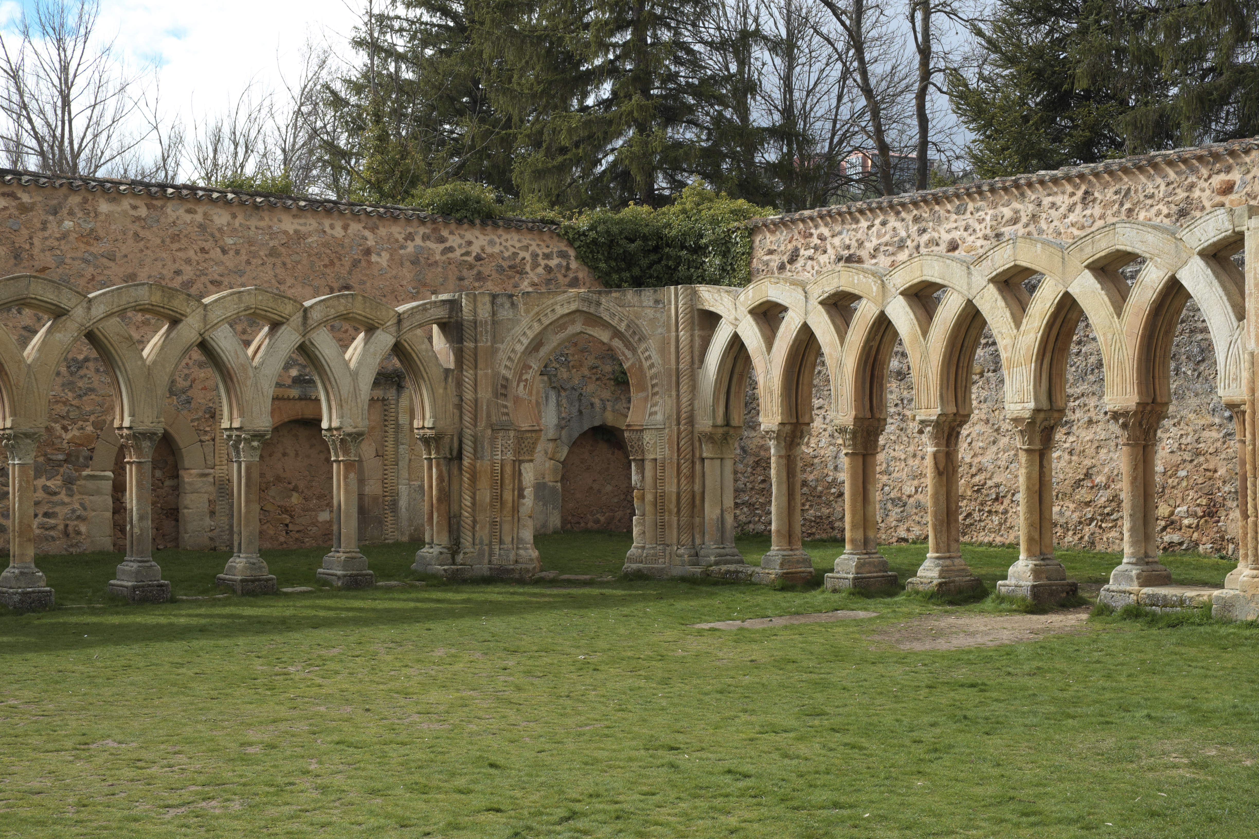 Kreuzgang des ehemaligen Johanniter-Klosters San Juan de Duero in Soria (Kastilien-León/Spanien)